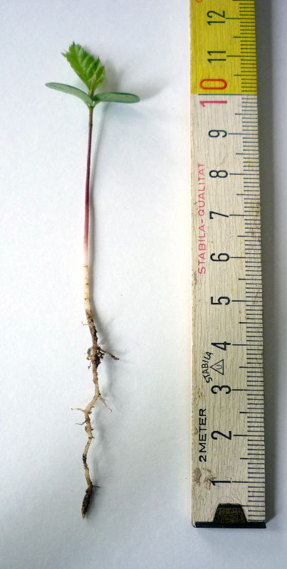 ausgegrabener Keimling einer Hainbuche mit Wurzel und den beiden typischen linsenförmigen Keimblättern